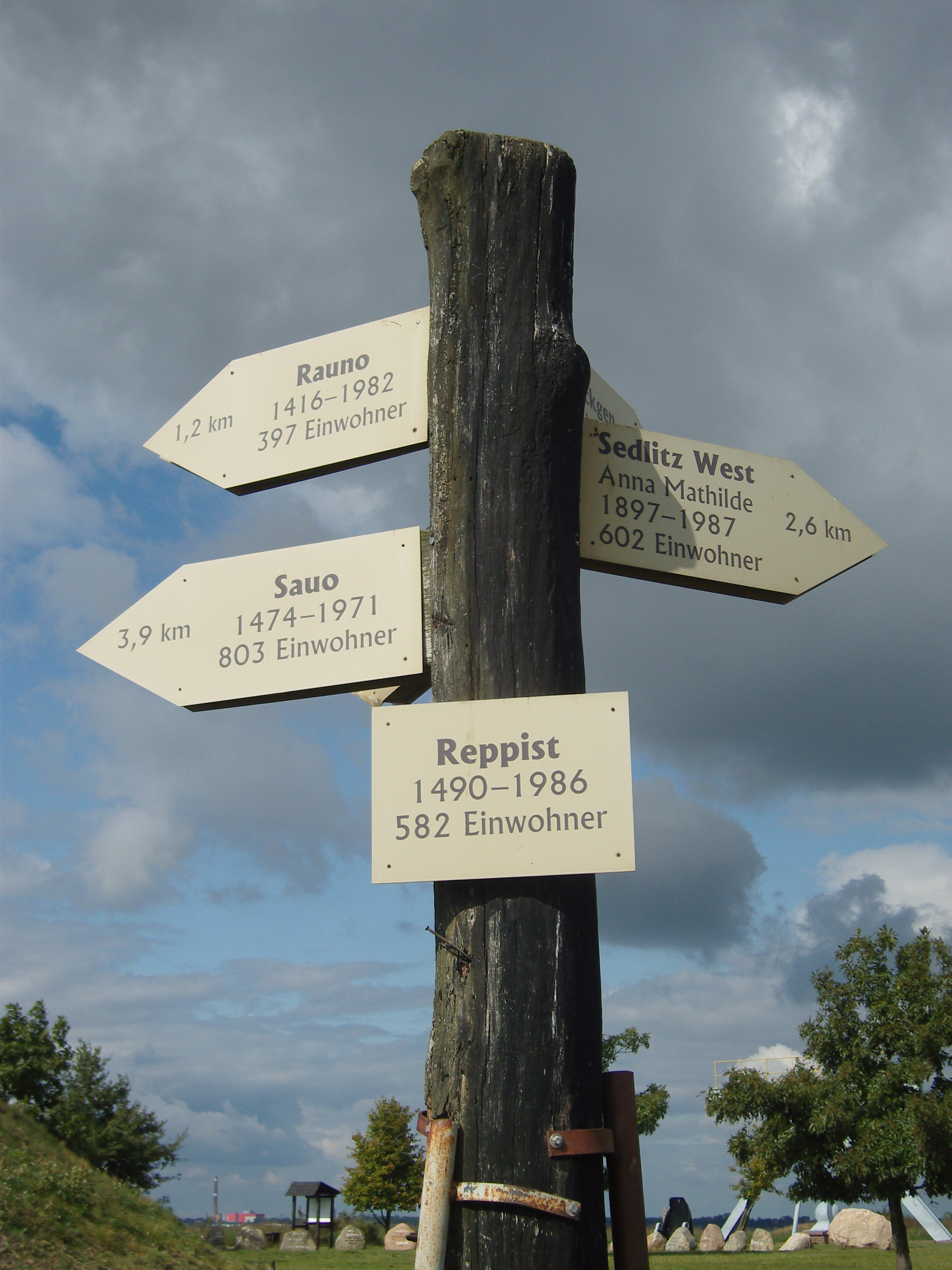 Wegweiser am Aussichtspunkt Reppist auf durch Tagebaue devastierte Orte